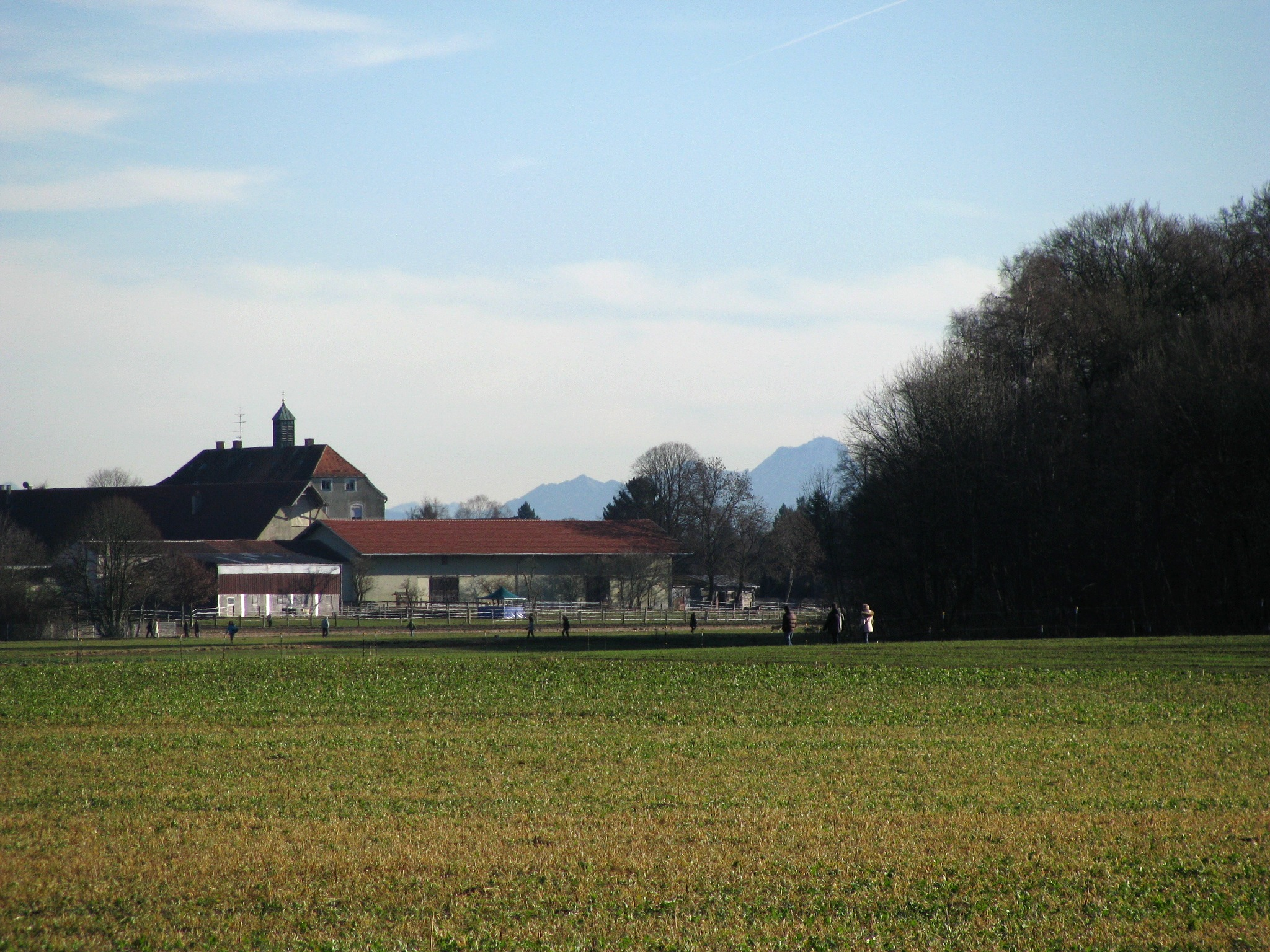 Gut Warnberg von der Waterloostraße aus gesehen, mit dem Wendelstein in nur scheinbarer Nähe dahinter